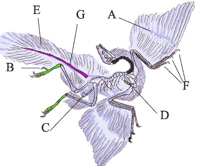 Schema d'Archaeopteryx